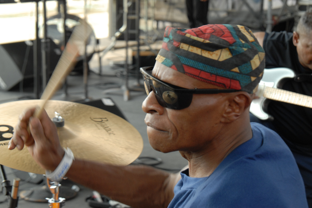 Willie Hall @ McCarren Park Pool Parties